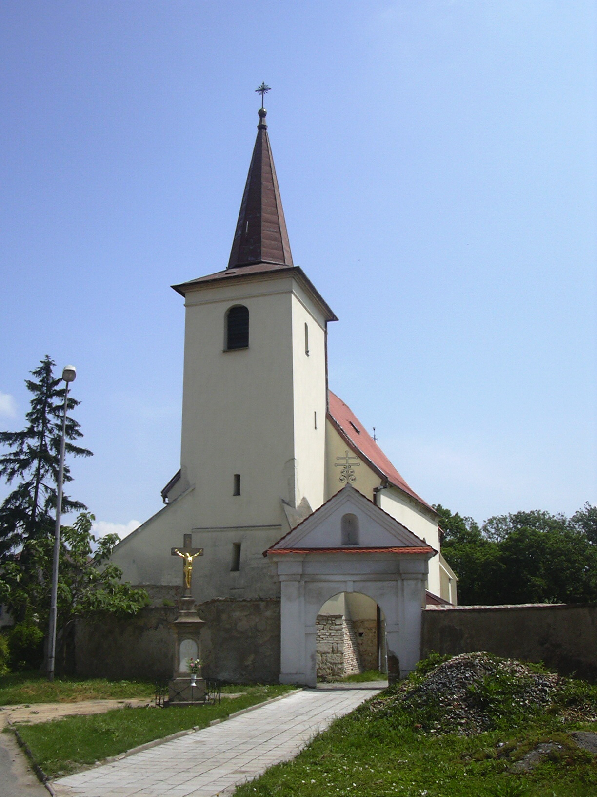 farní kostel sv. Barbory, Komořany (Vyškov District - Czech Republic)